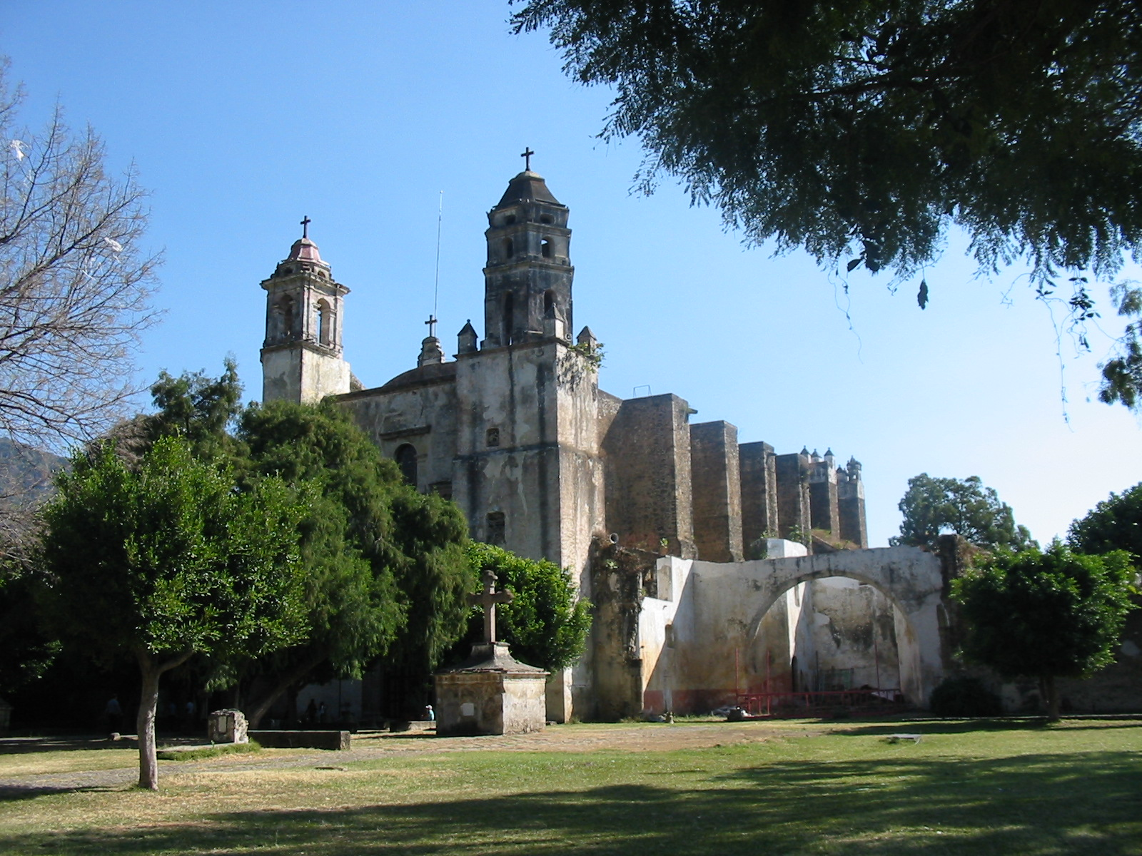 Ex Convento Dominico de la Natividad in Tepotzlán Mexico